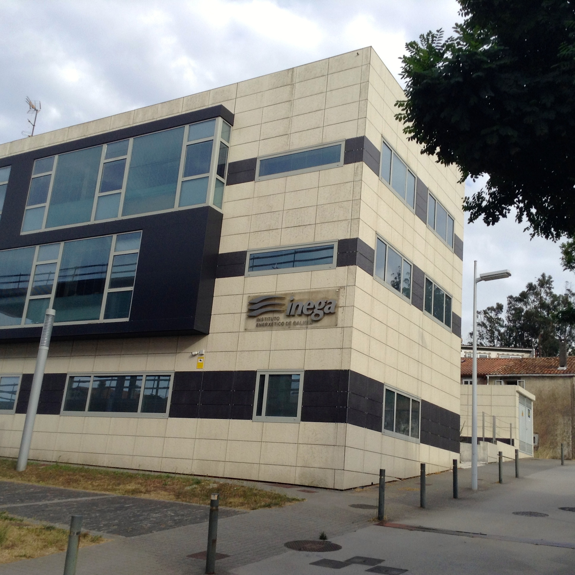 Sede o Instituto Enerxético de Galicia (INEGA) en Santiago de Compostela